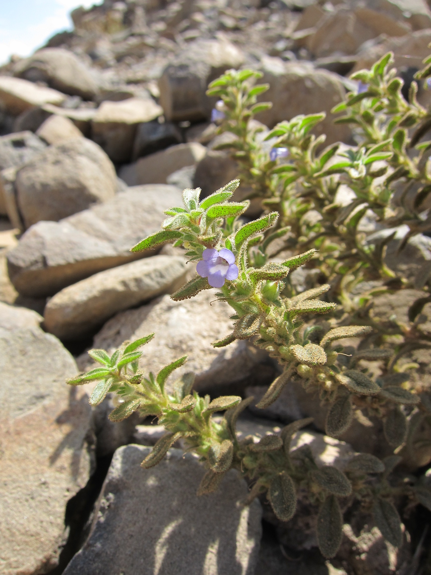 Boraginaceae, possiblement Echiochilon longiflorum, près d'Ali Sabieh, Djibouti